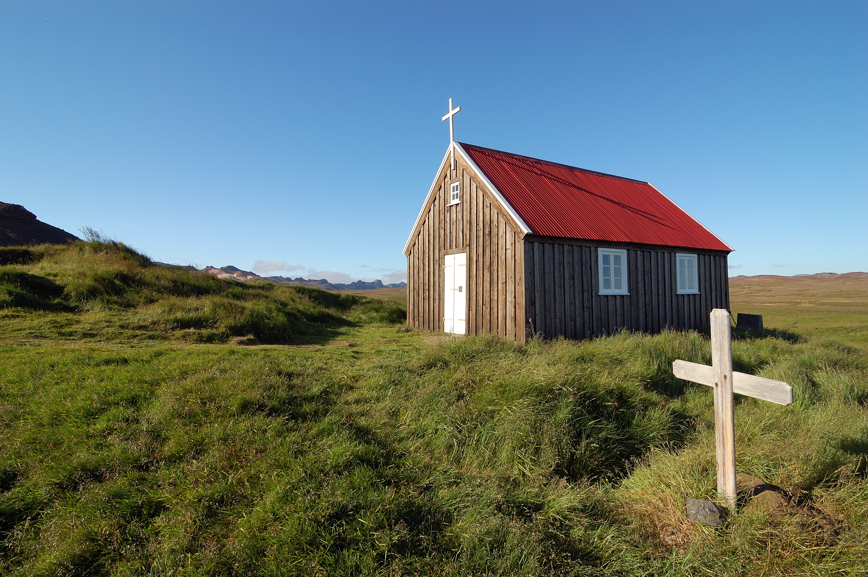 Krýsuvík, Iceland [2008]